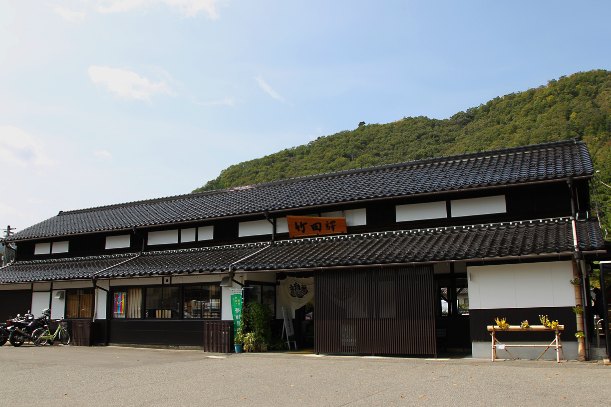 撮影:M.Kawai(Gifu,Japan) =画像投稿者(Masabb) 機材:Canon EOS-1D MarkIV, EF17-40mm F4L USM Data:2014.09.28 解説：JR西日本 播但線 竹田駅（兵庫）